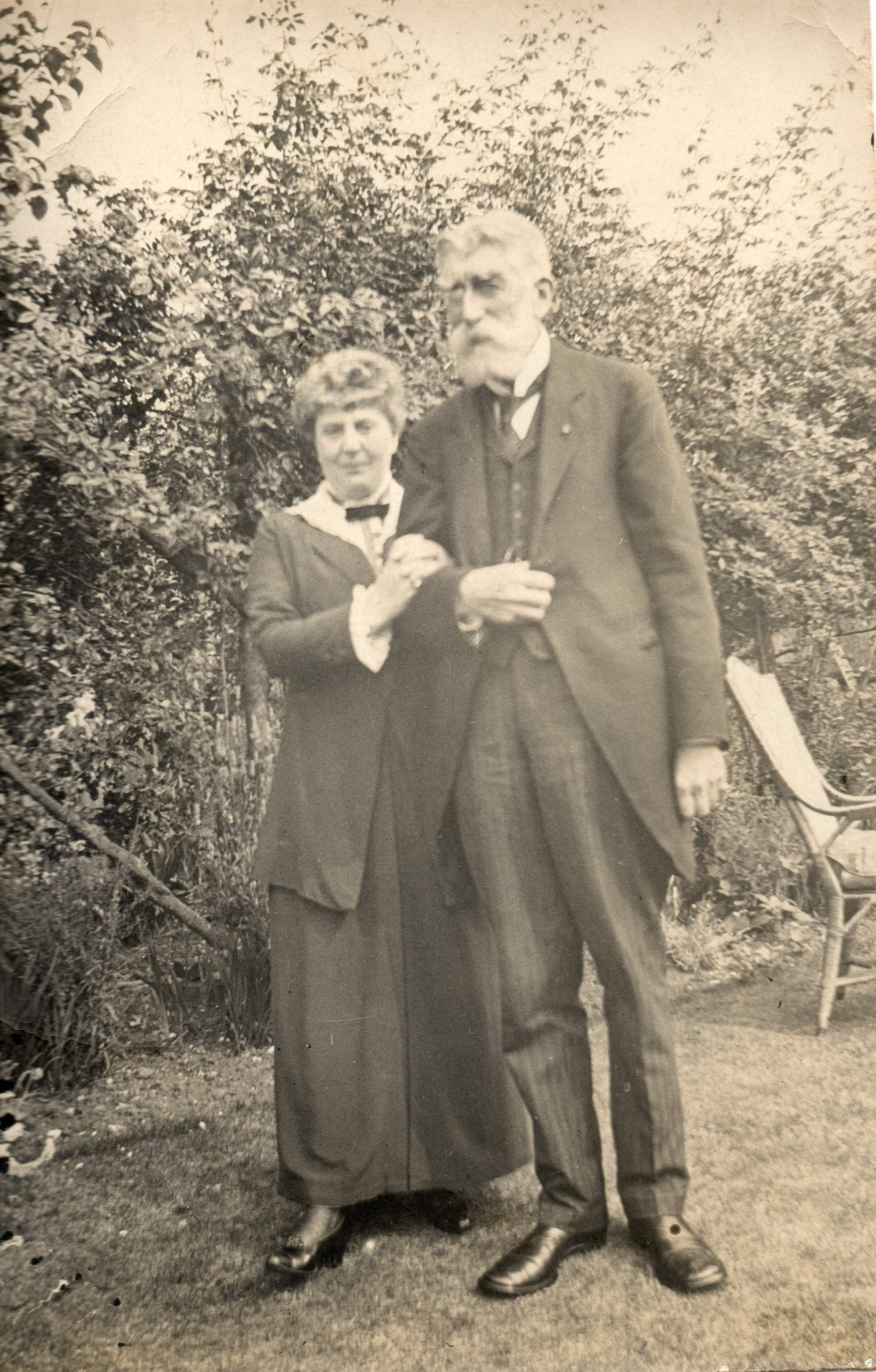 le comte Eugène Goblet et son épouse Alice Packard en 1916 à Guilford (UK).